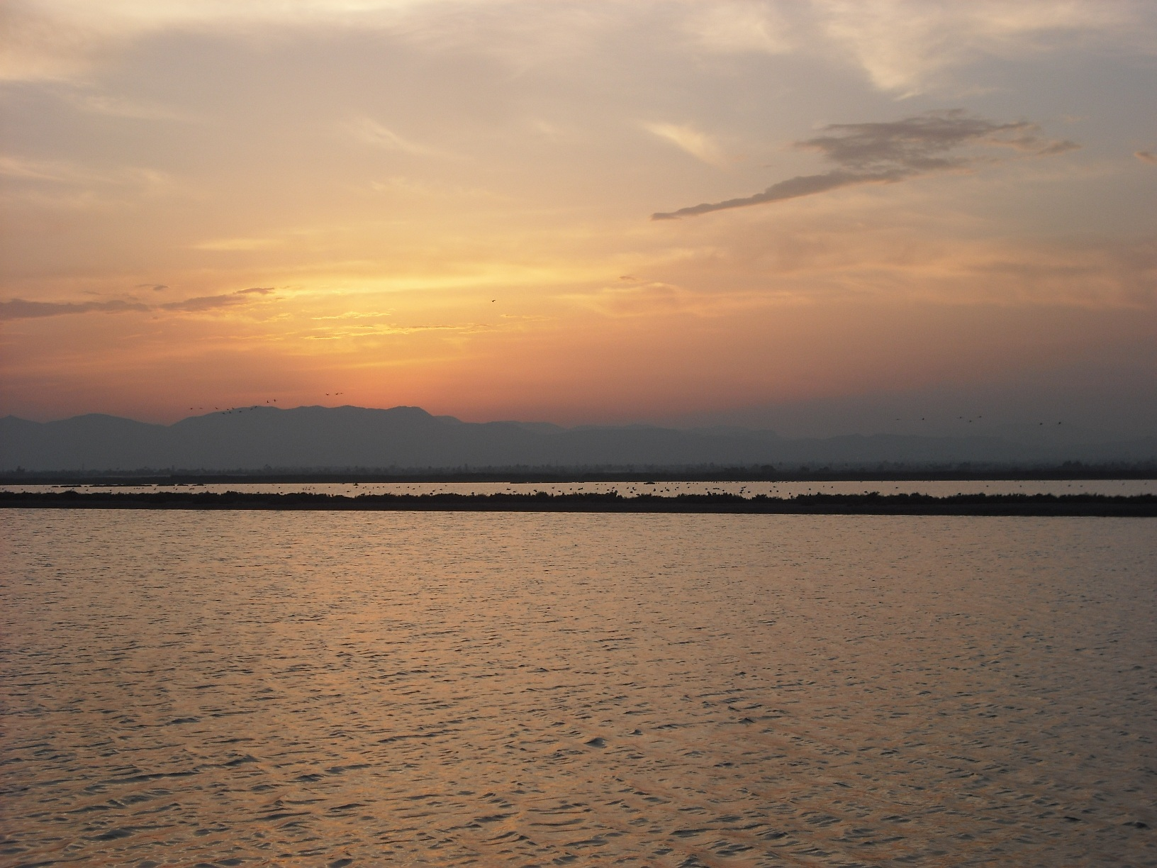 Posta de sol a les Salines de Santa Pola.